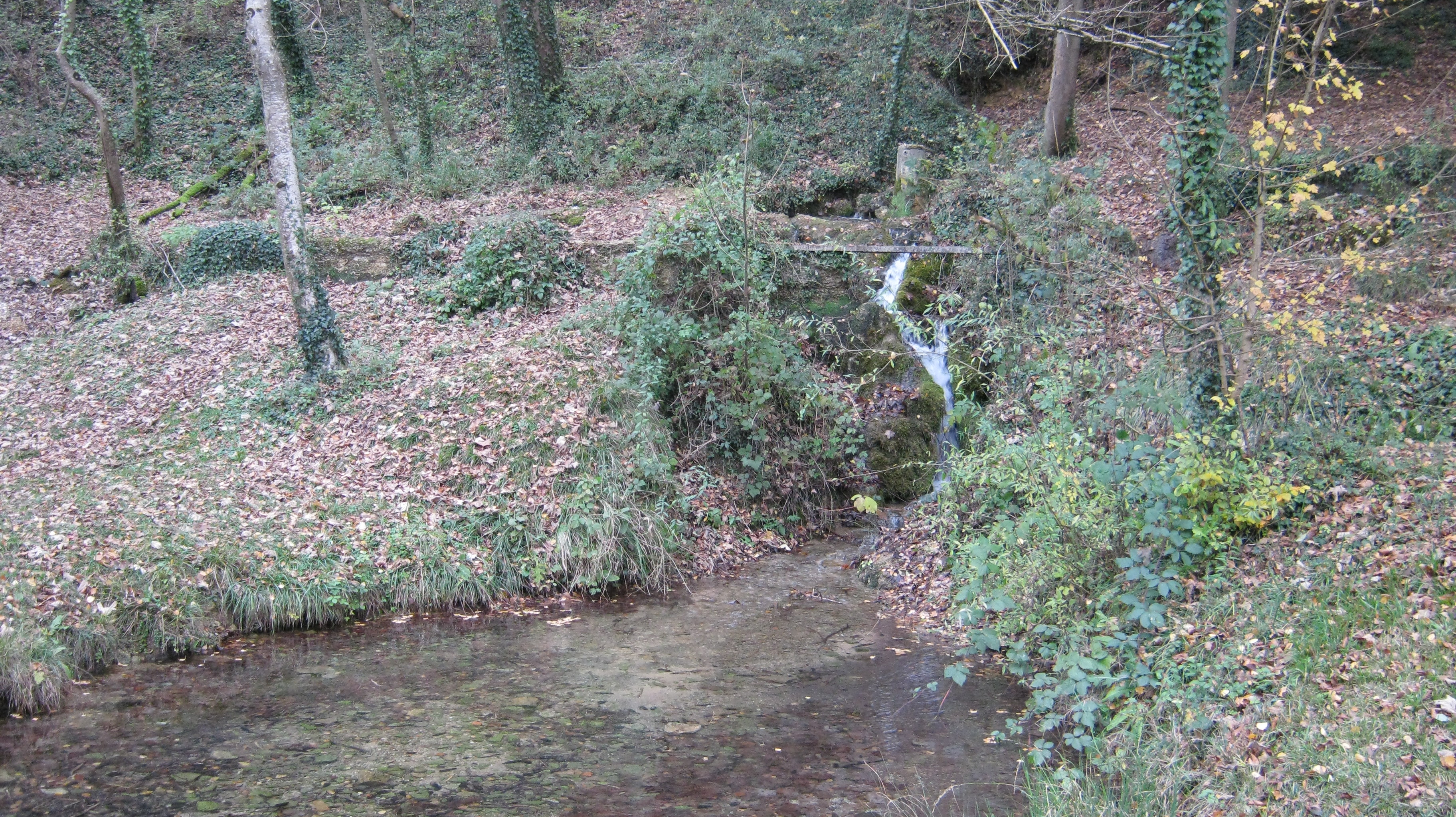 vue d'ensemble